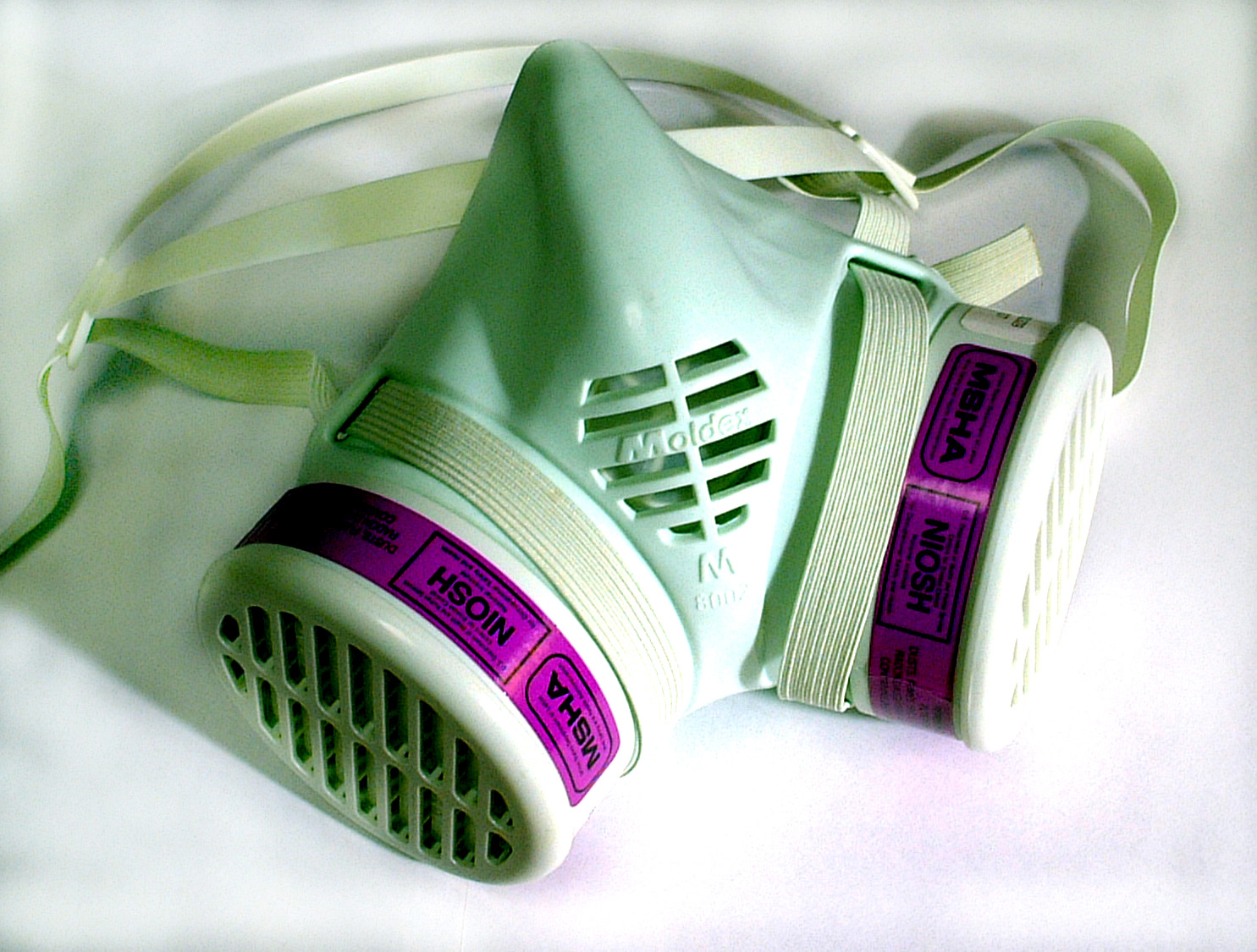 HEPA Mask